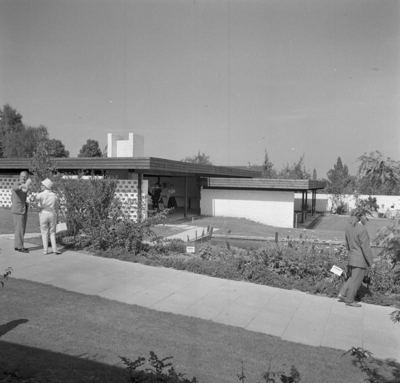 Bundesgartenschau 1961 Stuttgart 11.-16.9.1961